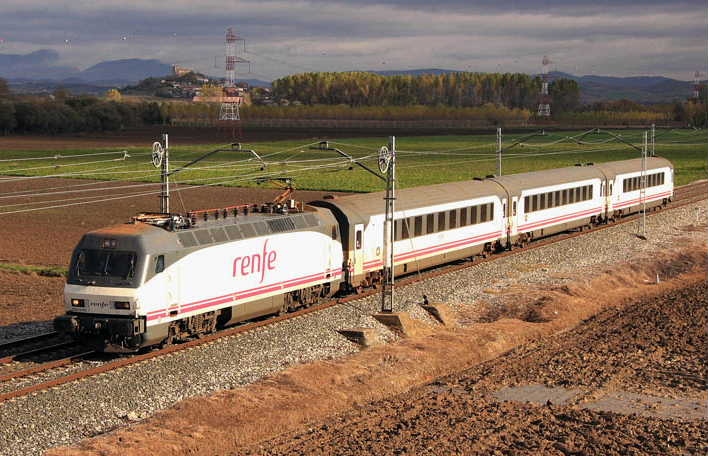 La locomotora 252.025 de Renfe Operadora con el Arco "Camino de Santiago" Irún - A Coruña por la línea Madrid-Hendaye a la altura de Jundiz (Vitoria, Gipuzkoa, País Vasco).